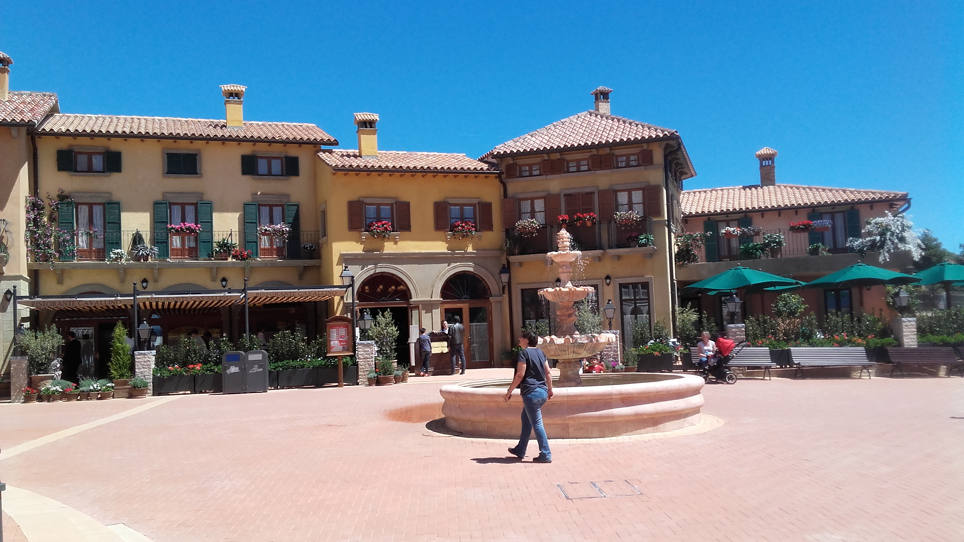 fl